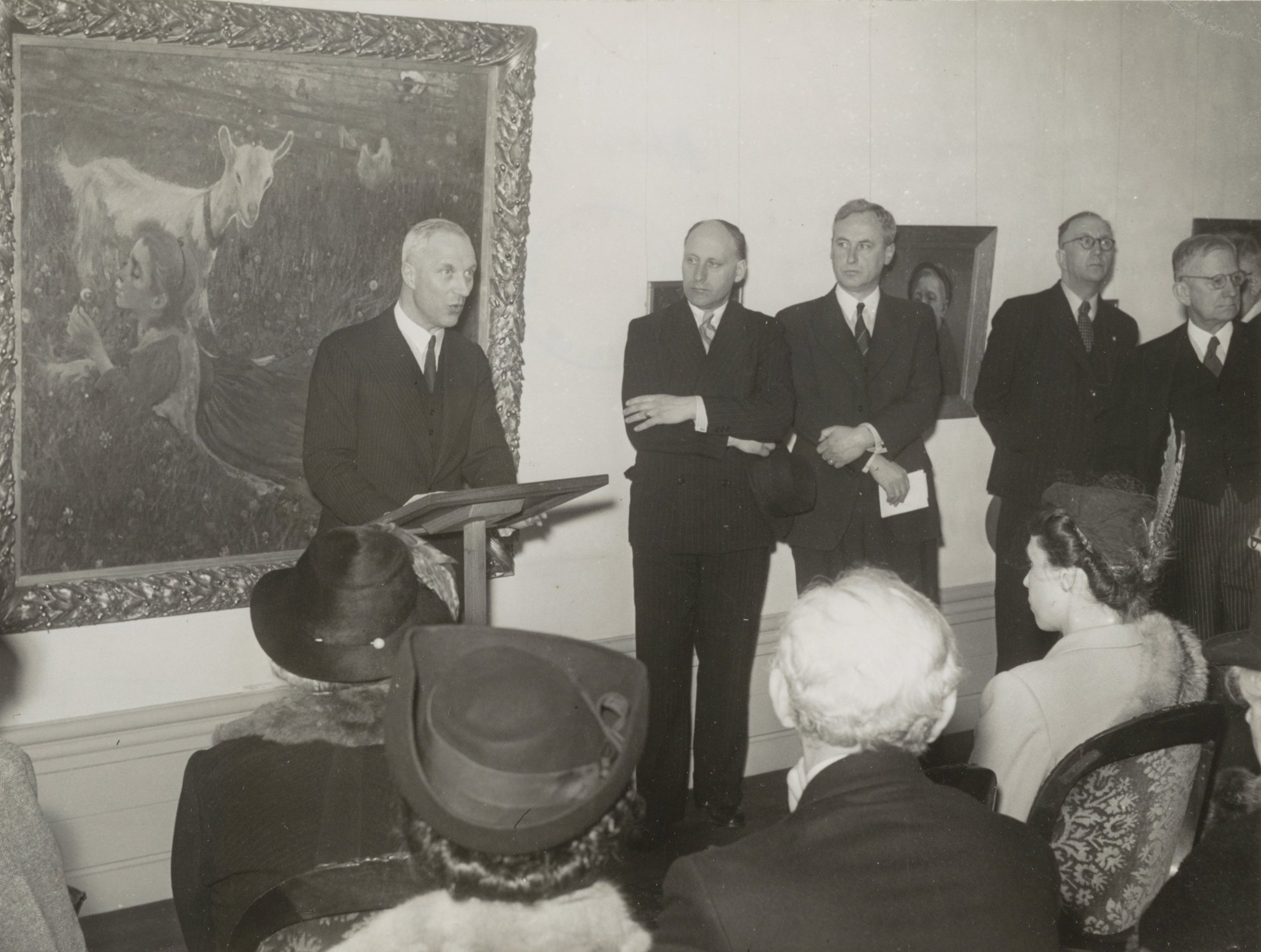 Opening van Museum Huis van Looy aan de Kleine Houtweg door Burgemeester Cremers. Achtergrond schilderij/pastel Jacobus van Looy 'Aaltje met geit' .